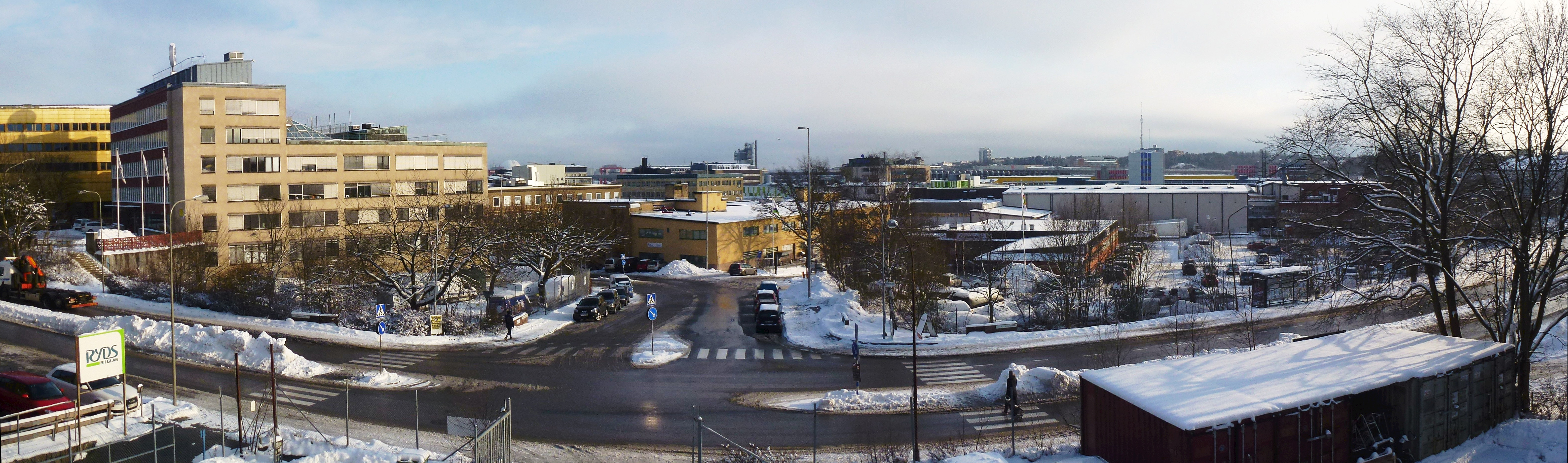 Västberga industriområde panorama, vy från Karusellplan